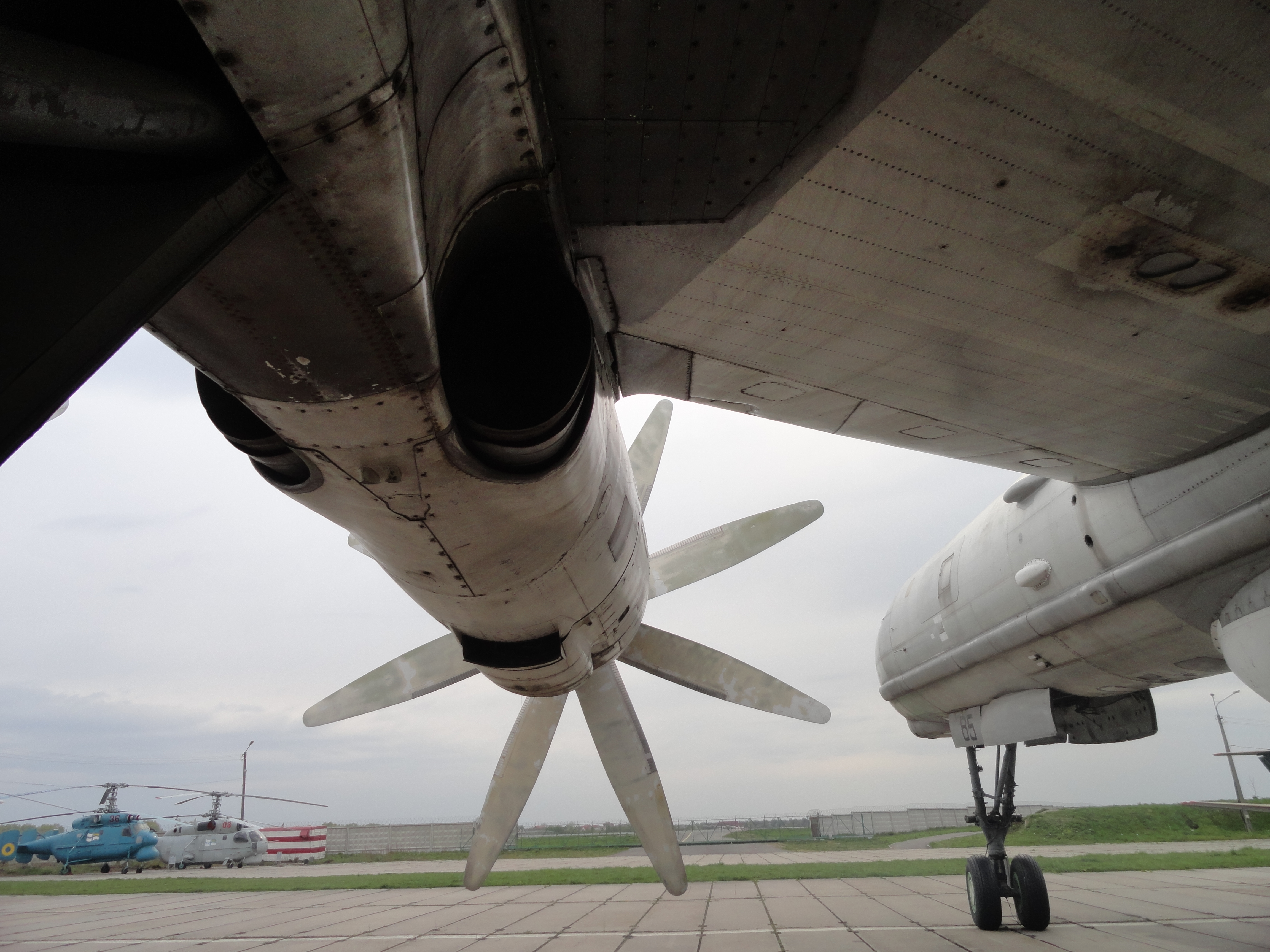 Мотогандола двигателя НК-12 на самолёте Ту-142. Киевский музей авиации.